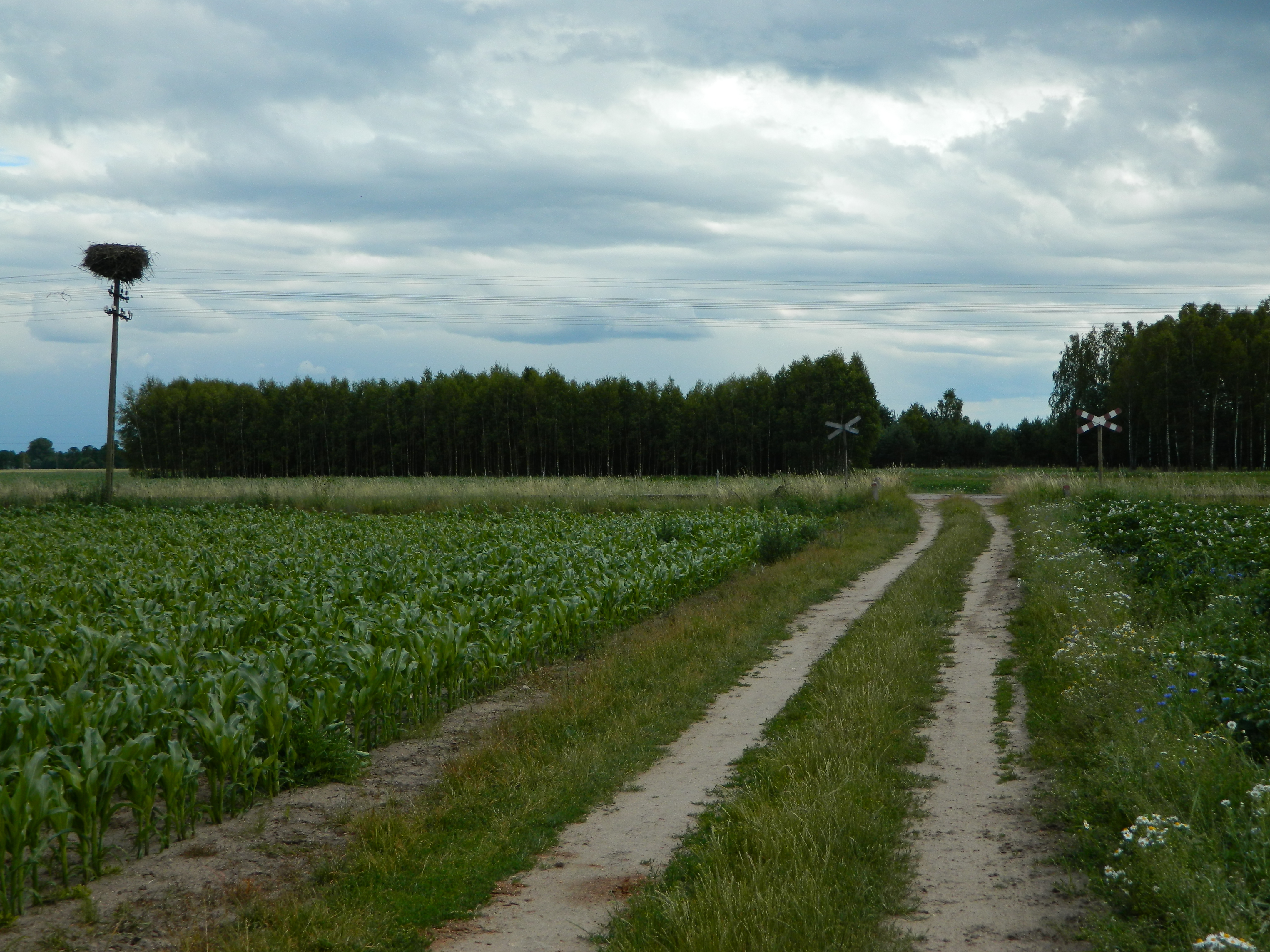 Bocianie gnizado, przed stacją Jeruty